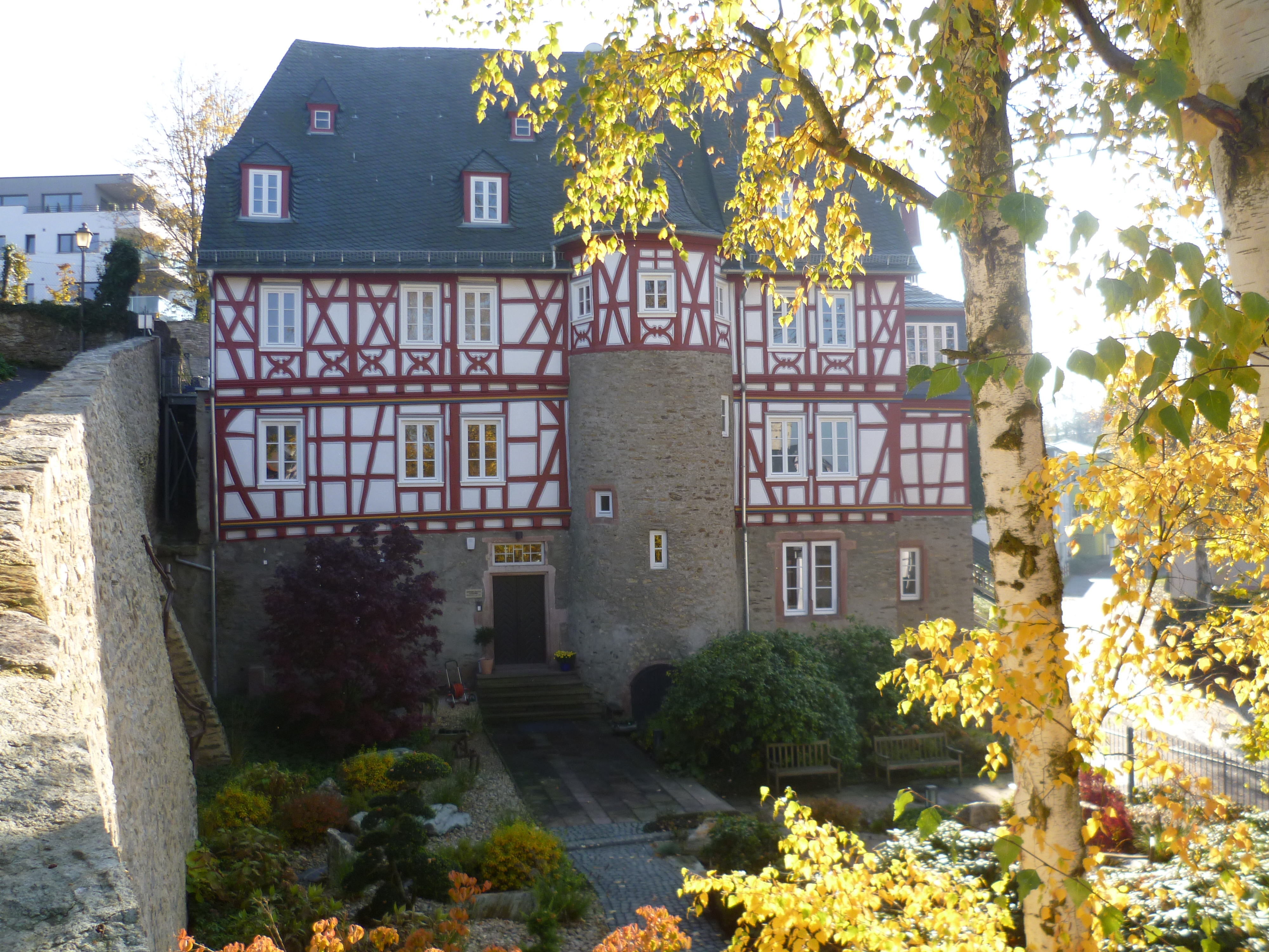 Stockheimer Hof - Obergasse 31 - früher auch calmischer Hof